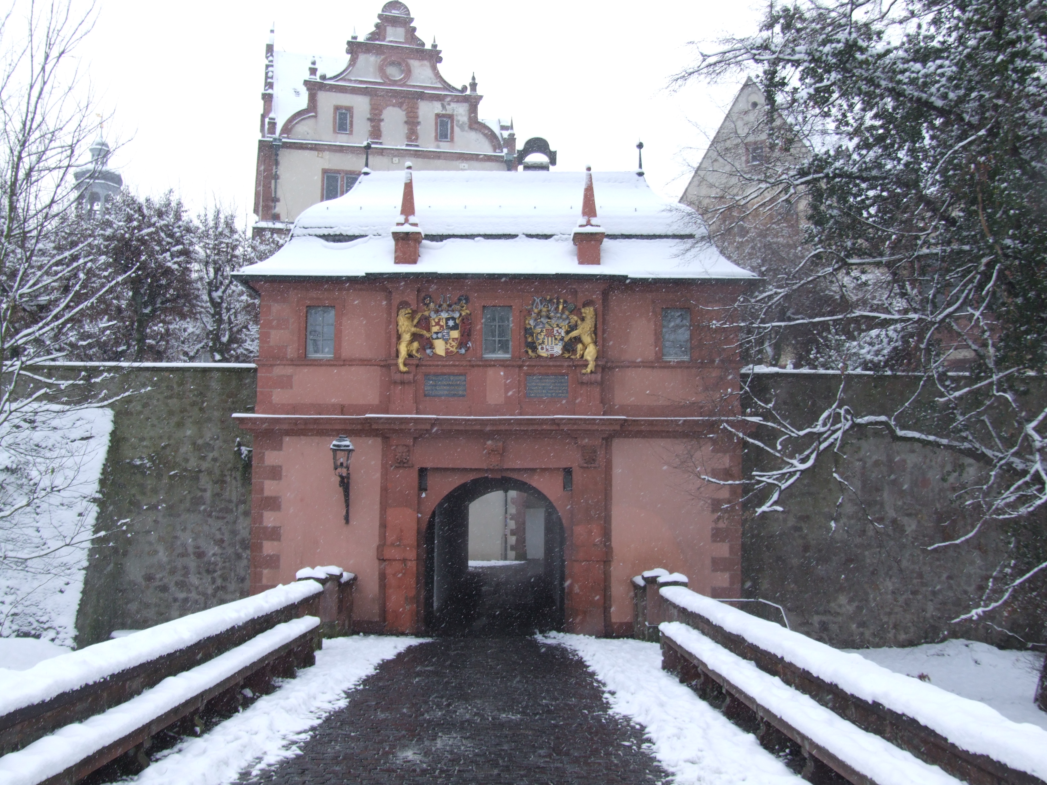 Nordseite des Darmstädter Schlosses im Winter, Schlosseingang